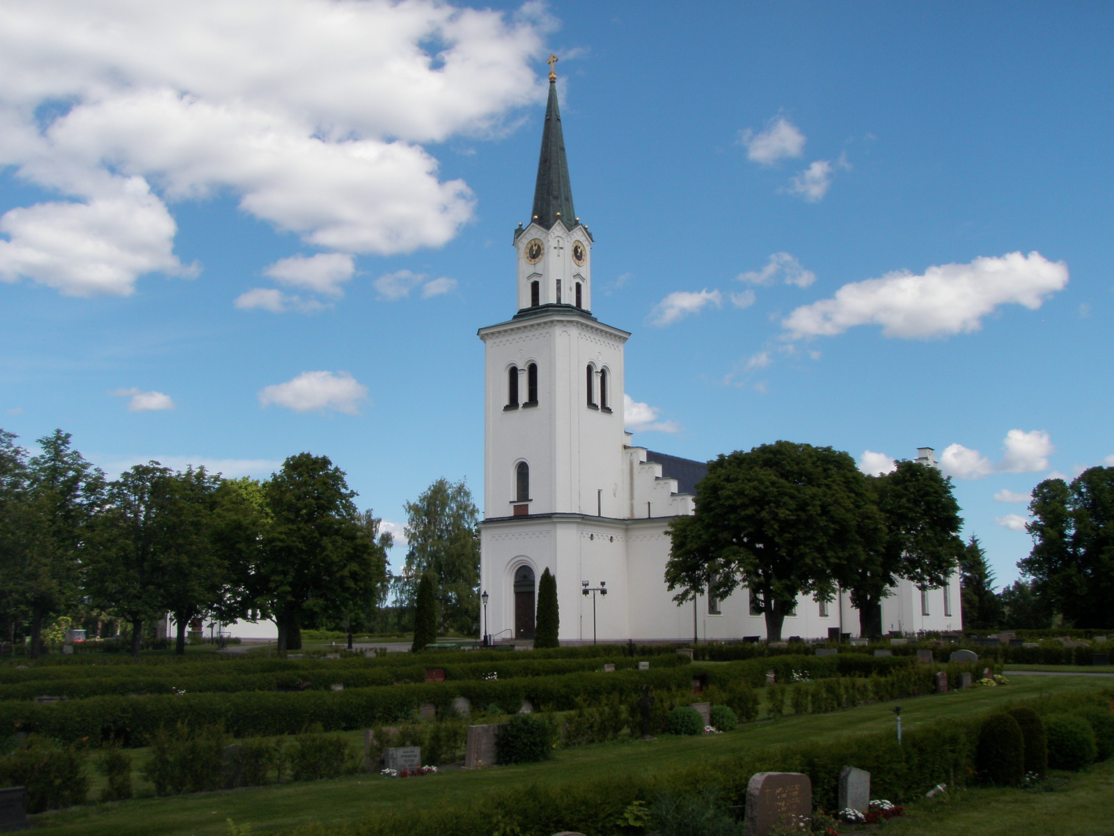 Risinge nya kyrka, som stod färdig 1849, är en kyrkobyggnad i Risinge socken och församling, Finspånga läns härad, Östergötland. Den ligger 4 km öster om Finspång och tillhör Linköpings stift.